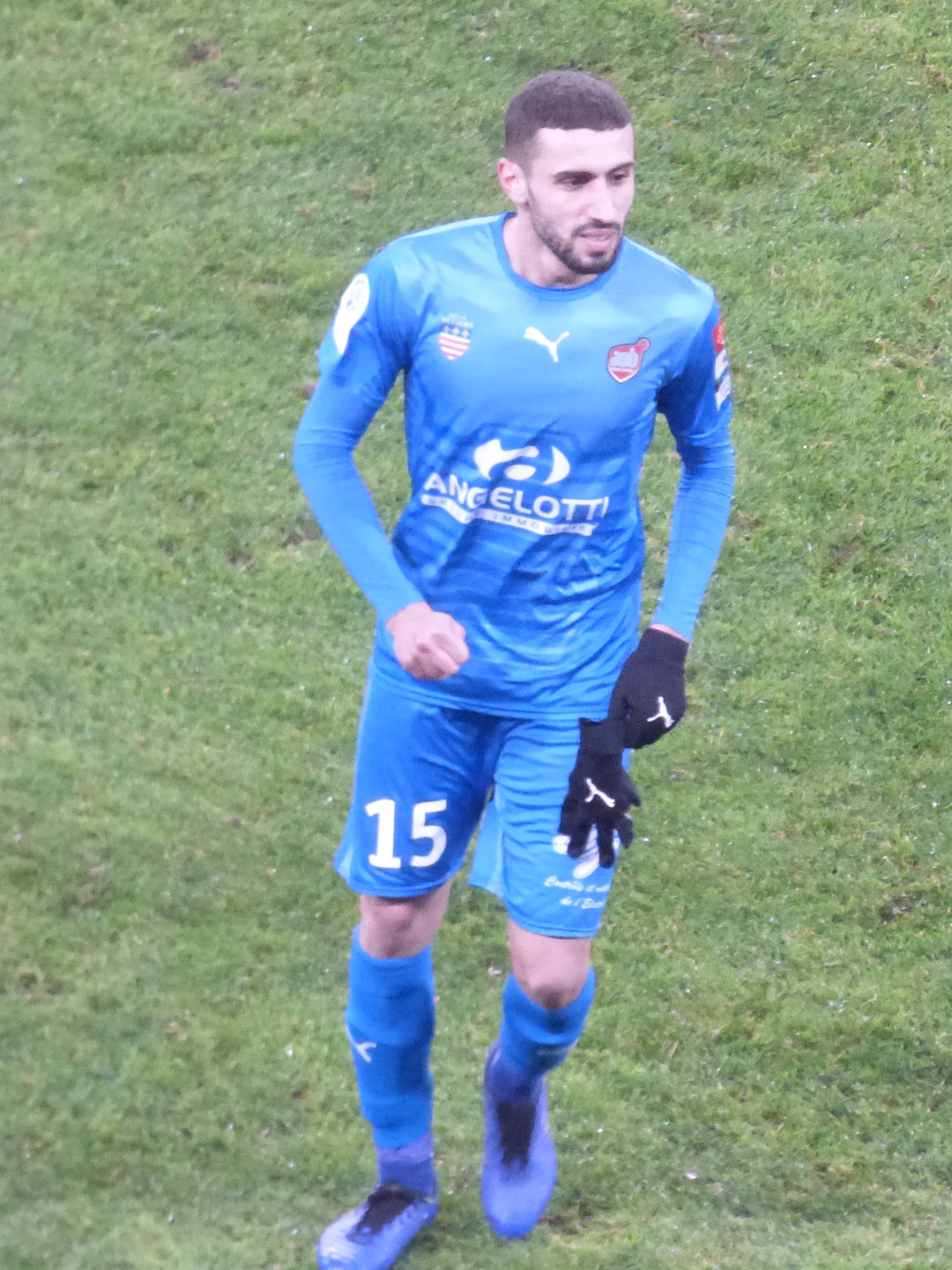 Amir Nouri après le match RC Lens / AS Béziers, comptant pour la 23ème journée du championnat de France de football de Ligue 2 2018-2019, le 4 février 2019, au Stade Bollaert-Delelis.